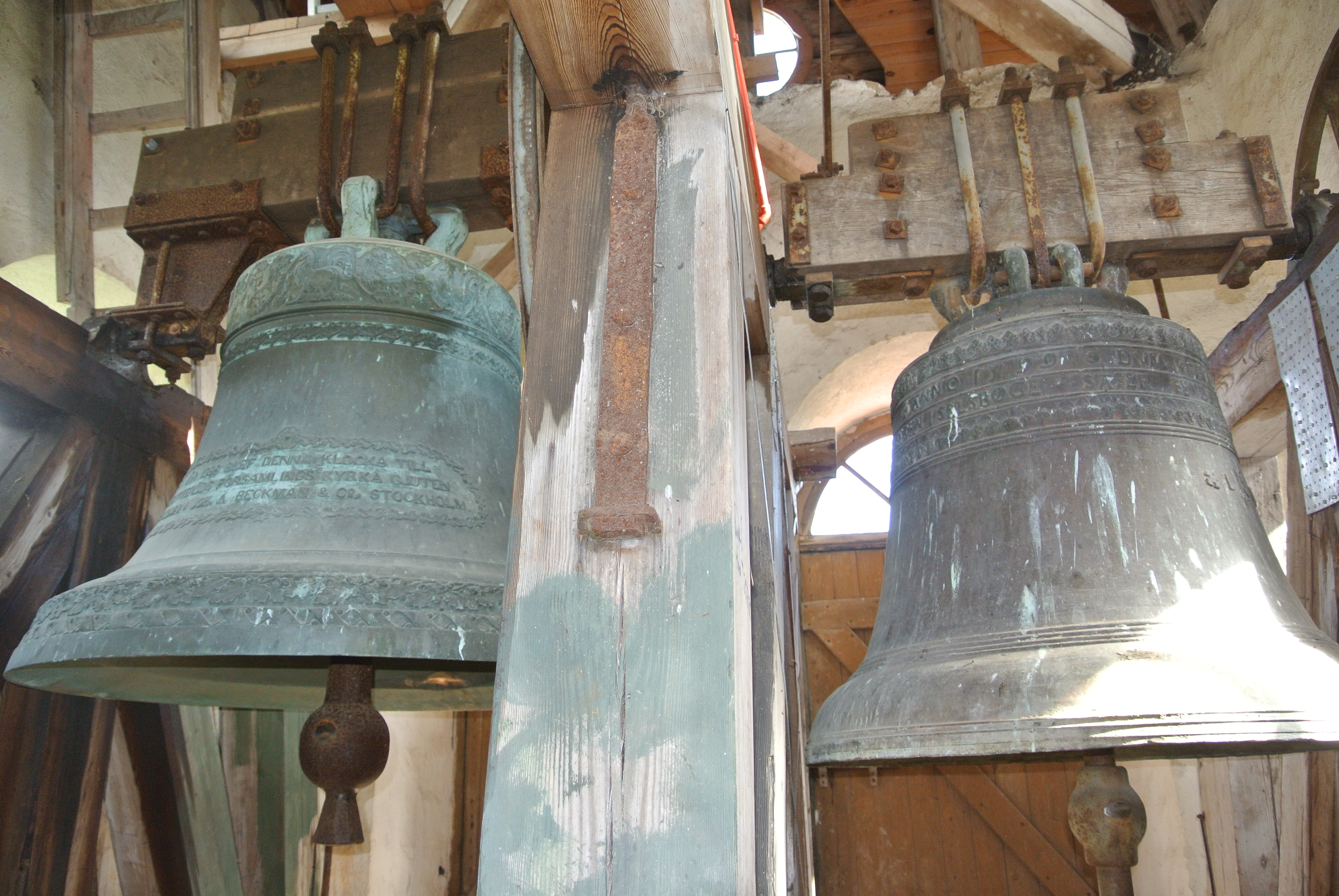 Matteröds kyrkas klockor. Storklockan är gjuten år 1890 av Johan Beckman i Stockholm och lillklockan ar från år 1599